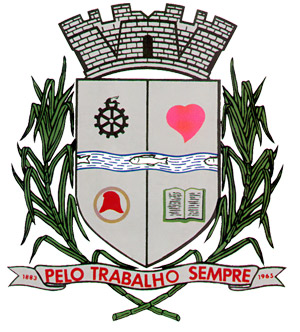 Brasão oficial da cidade de Rafard - SP. Fonte Extraído do site oficial da cidade em